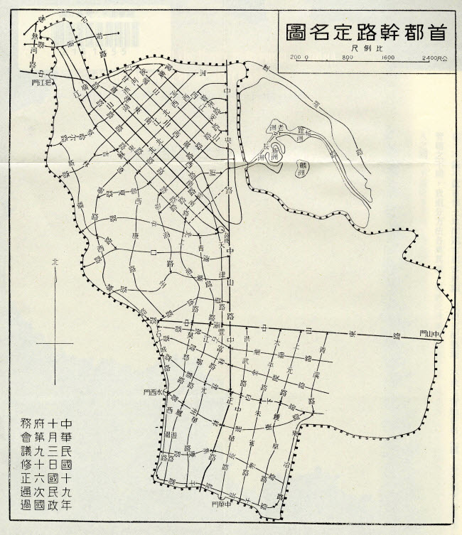 中文（中国大陆）: 民国19年10月3日国民政府第96次国务会议通过